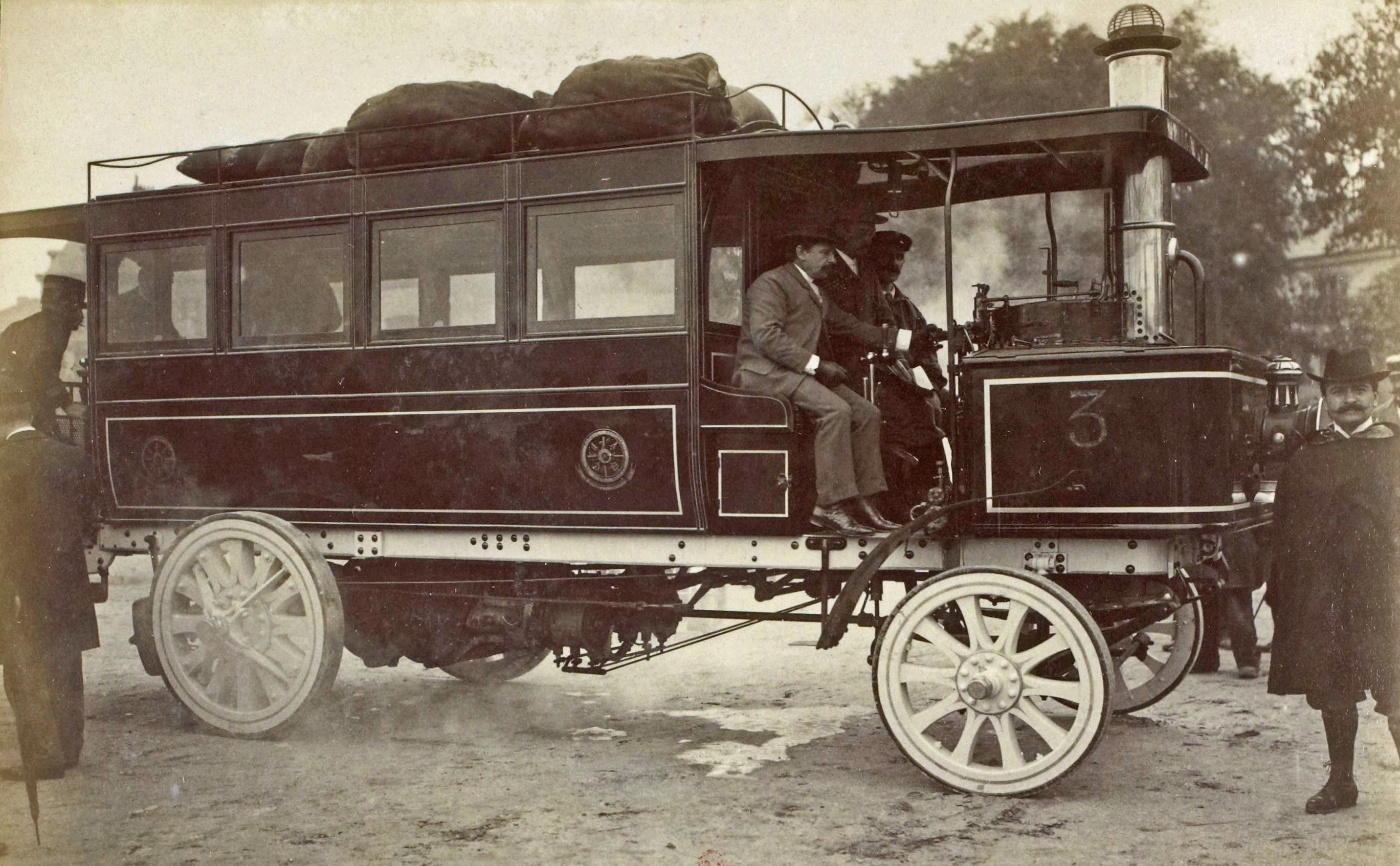 [Collection Jules Beau. Photographie sportive] : T. 10. Année 1899 / Jules Beau : F. 33v. [Poids lourds]